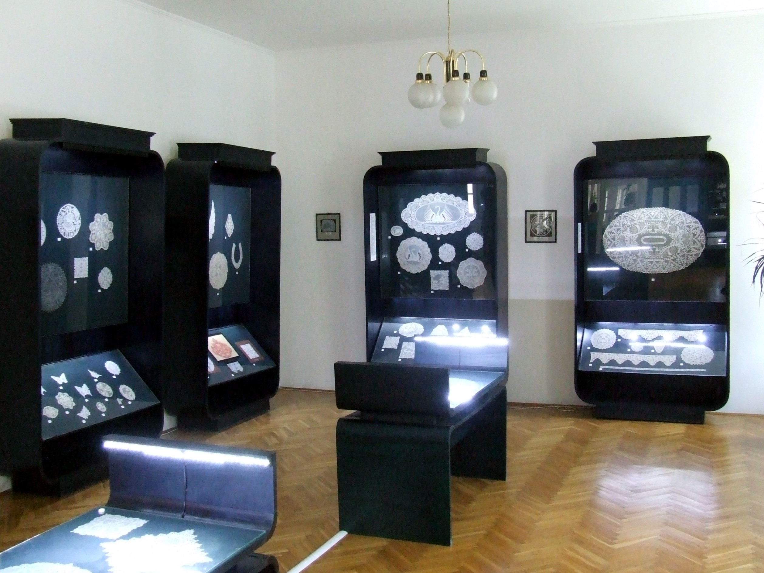 A kiskunhalasi Csipkeház és Csipkemúzeum kiállítóterme